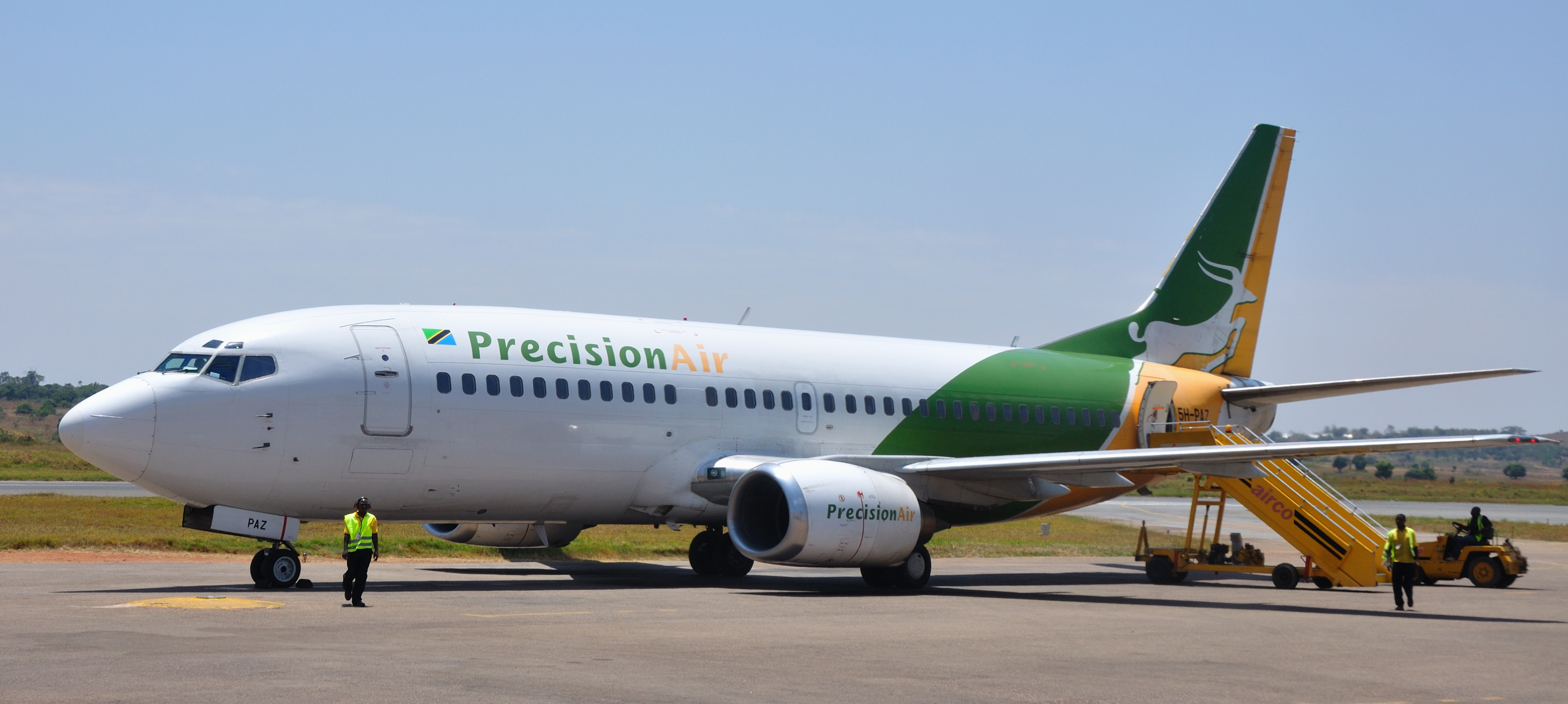 Tanzania, views in Mwanza